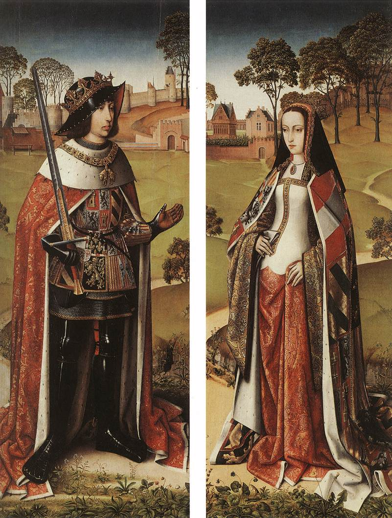 Volets du triptyque de Zierikzee.Volet de gauche : portrait de Philippe le beau. Volet de droite : portrait de jeanne la folle.